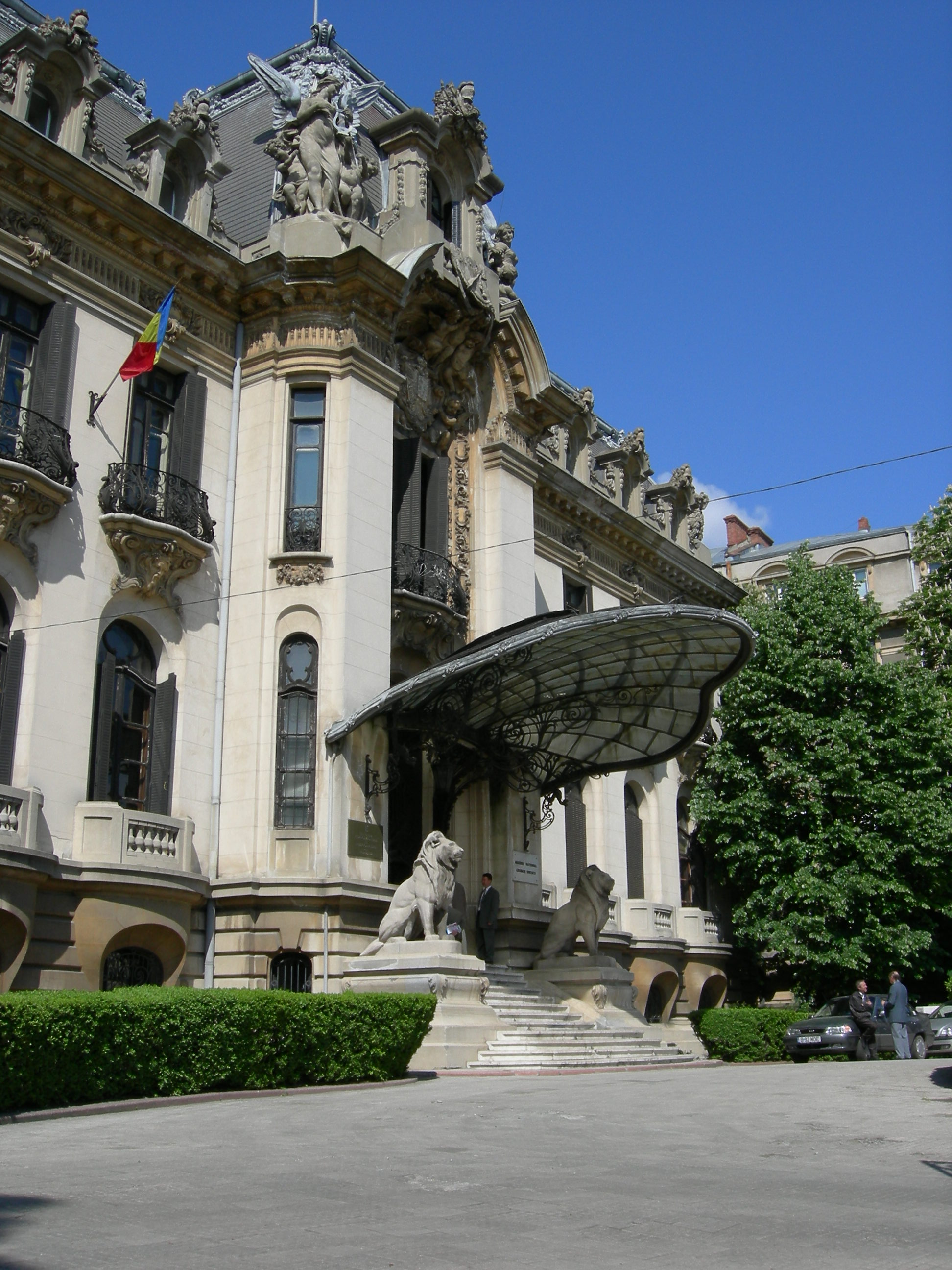 George Enescu Museum (Cantacuzino Palace), Calea Victoriei, Bucharest, Romania